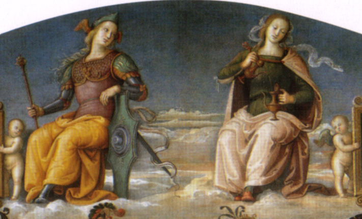 Raffigurazione delle virtù della Fortezza e della Temperanza (dettaglio)